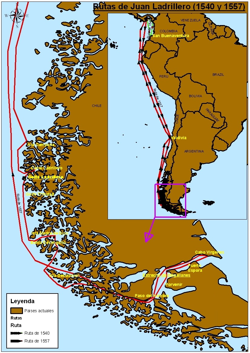 Plano de rutas de exploración de Juan Ladrillero.